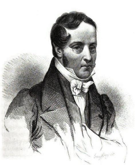 Peyronnet